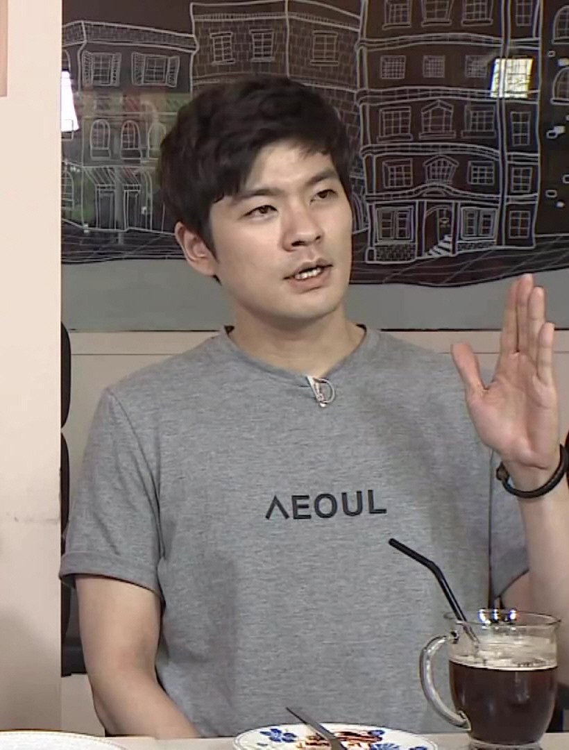 장기하, 하세가와 요헤이 출연 건강한 디저트 마카롱 고양시 일산동구 식사동 맛집 더가미 (식신로드 Gourmet Road) EP 188-1